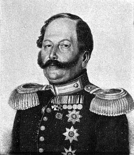 Русский генерал барон Иван Петрович фон Оффенберг. Этот рисунок был также использован для иллюстрирования статьи «Оффенберг, Иван Петрович, барон» опубликованной в семнадцатом томе «Военной энциклопедии», который был издан книгоиздательским товариществом И. Д. Сытина в 1914 году в столице Российской империи городе Санкт-Петербурге. Более подробное описание к этой картинке можно прочесть в указанной выше статье на сайте Русской Викитеки.